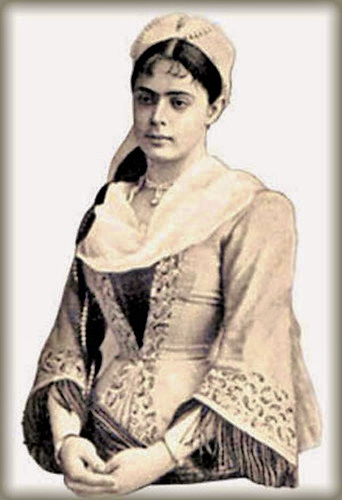 Evlalija Kadmina nel ruolo di Ännchen, protagonista del singspiel "Il franco cacciatore" di Carl Maria von Weber